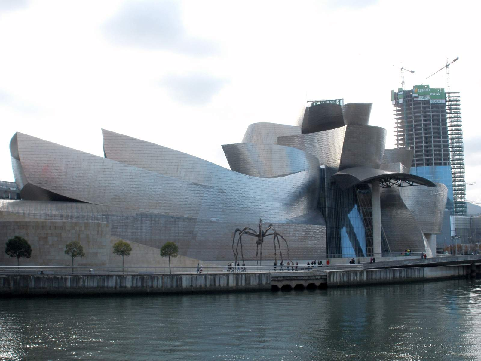 Museo Guggenheim Bilbao